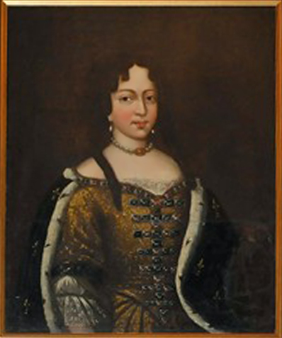 Teofila Ludwika Zasławska (ca.1650–1709)